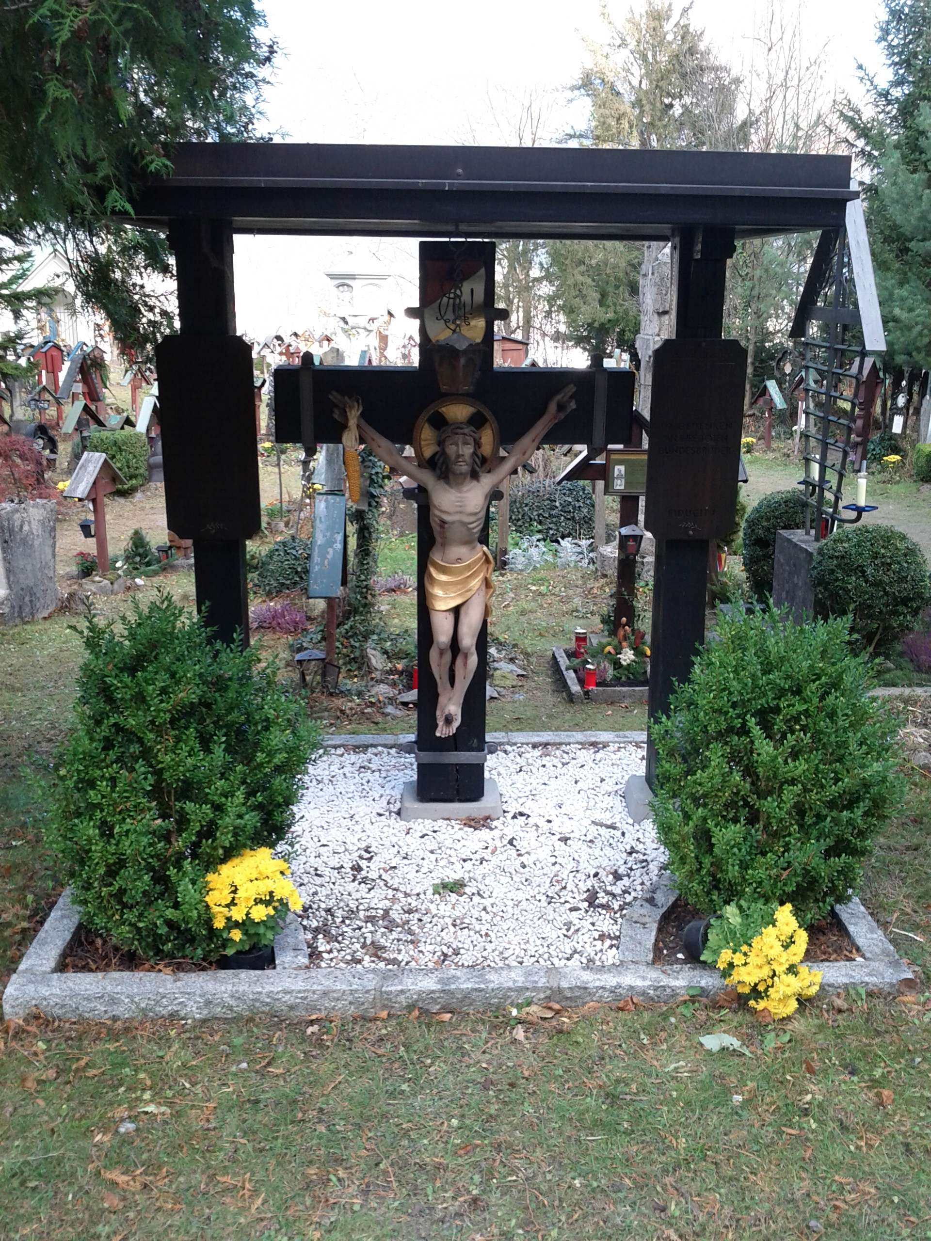 Denkmal der Studentenverbindung Amelungia - Tummelplatz, Amras This media shows the remarkable cultural object in the Austrian state of Tyrol listed by the Tyrolean Art Cadastre with the ID 42036. (on tirisMaps, pdf, more images on Commons, Wikidata)